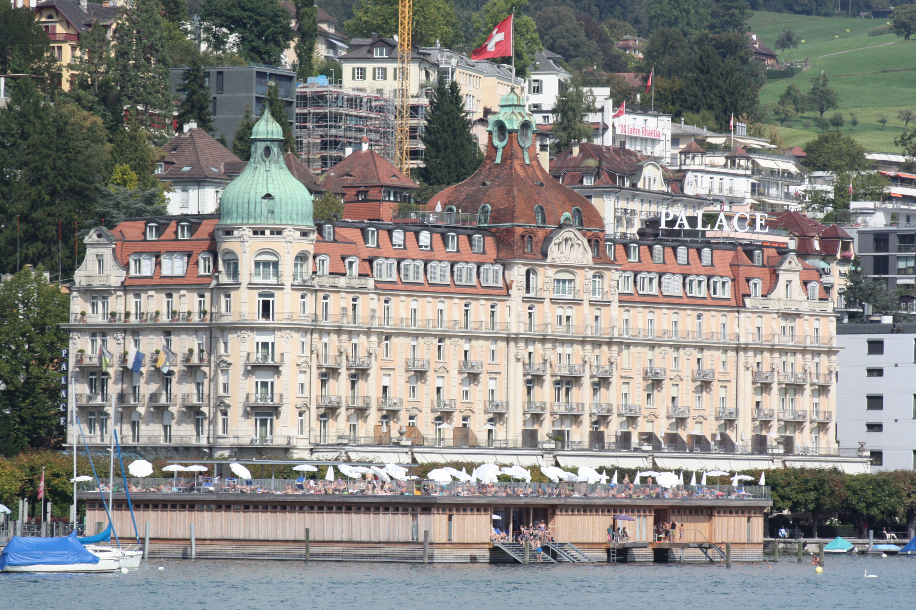 Hotel Palace